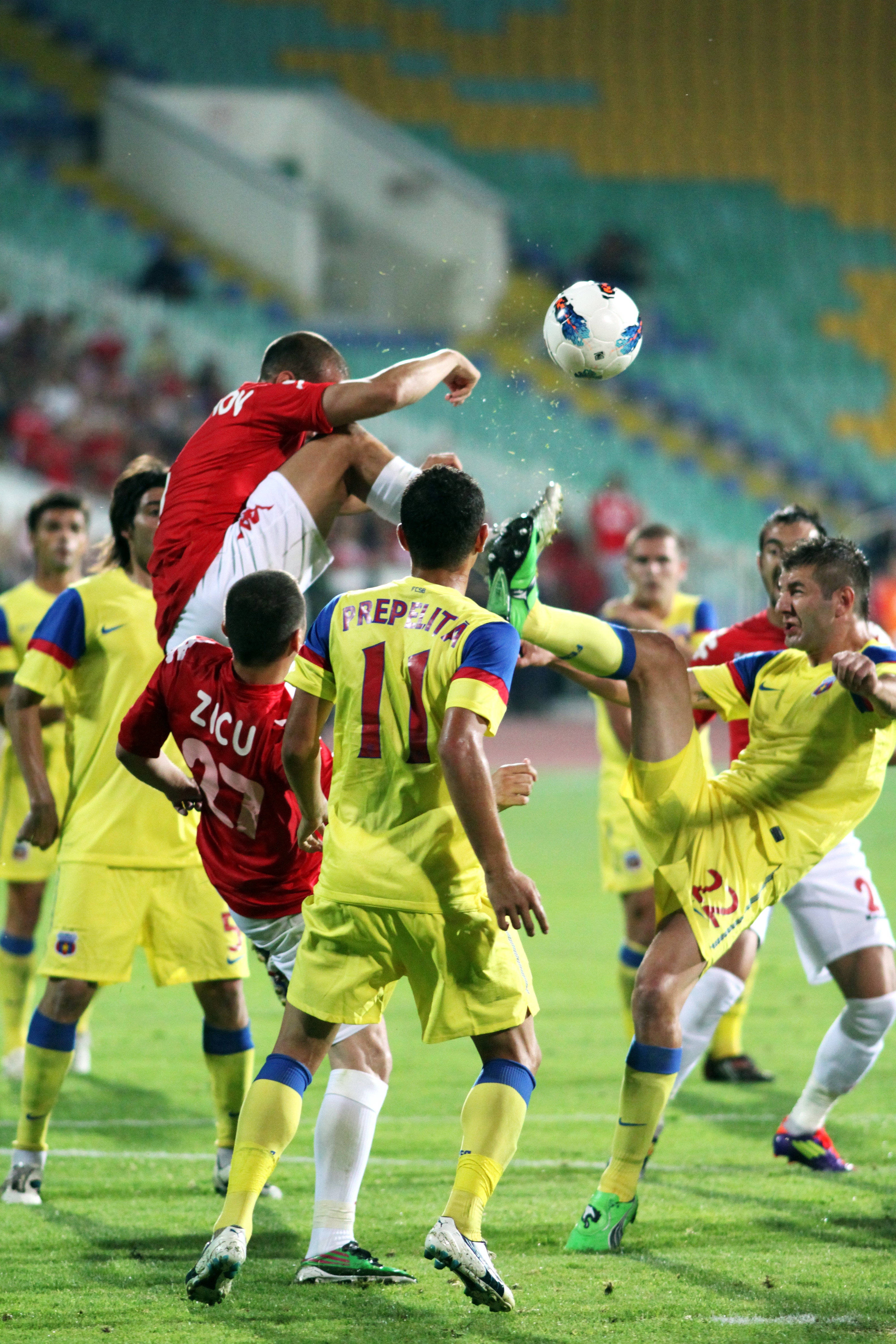 Момент от срещата от турнира Лига Европа ПФК ЦСКА (София)-Стяуа (Букурещ